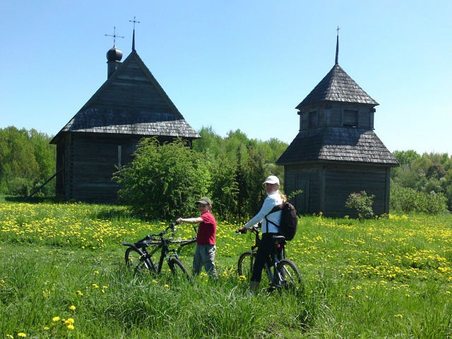 в музее Строчица